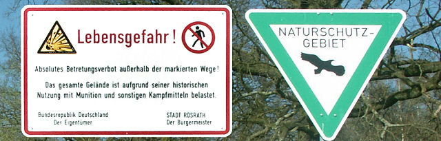 Schilder im Naturschutzgebiet „Wahner Heide (GL)“ in Rösrath – Lebensgefahr im Naturschutzgebiet